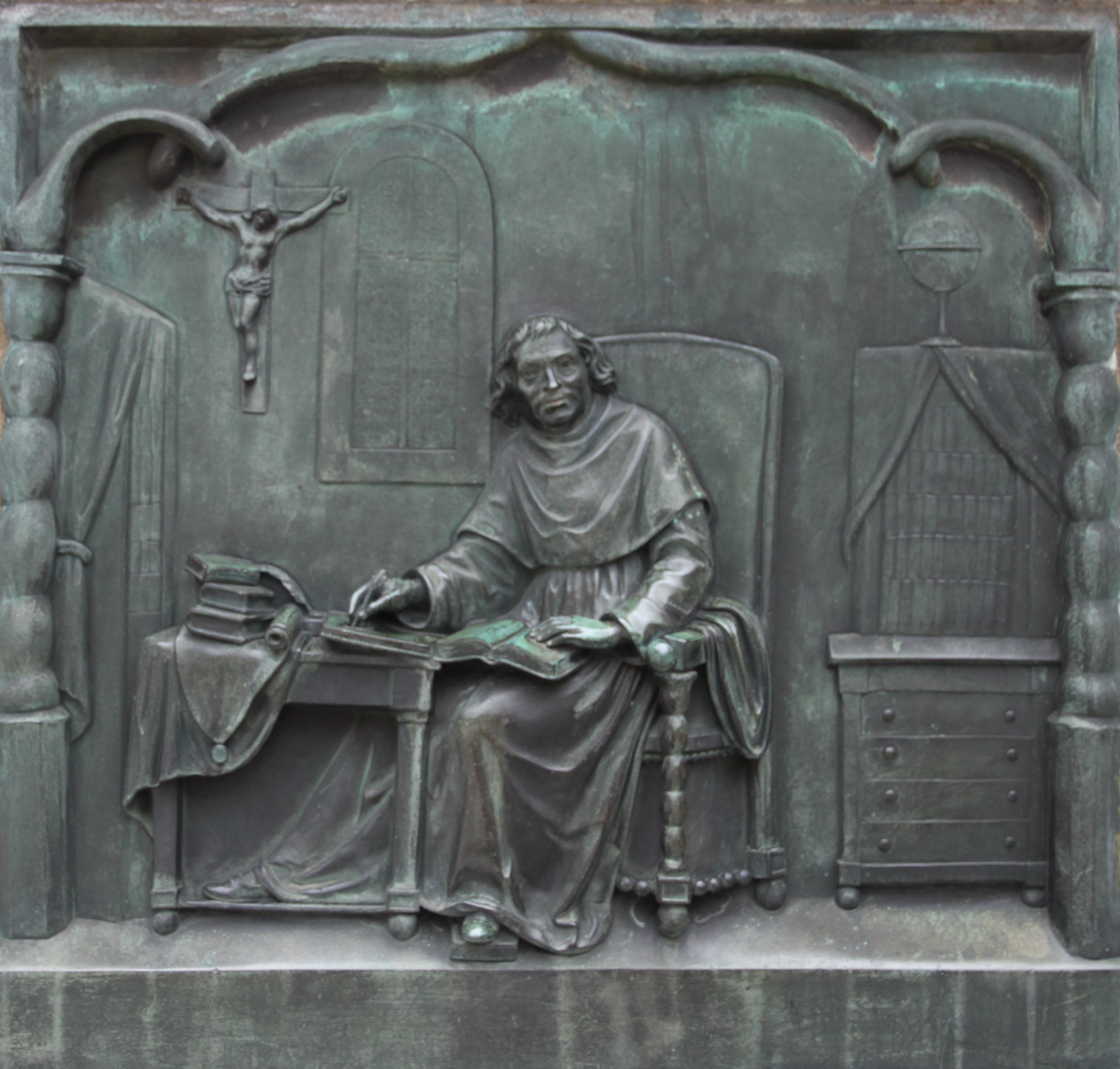 Père Girard, der Gelehrte, 1861, Relief von Raphael Christen von Wolfenschiessen (Unterwalden), auf dem Denkmal des Père Girard in Freiburg i. Üe.